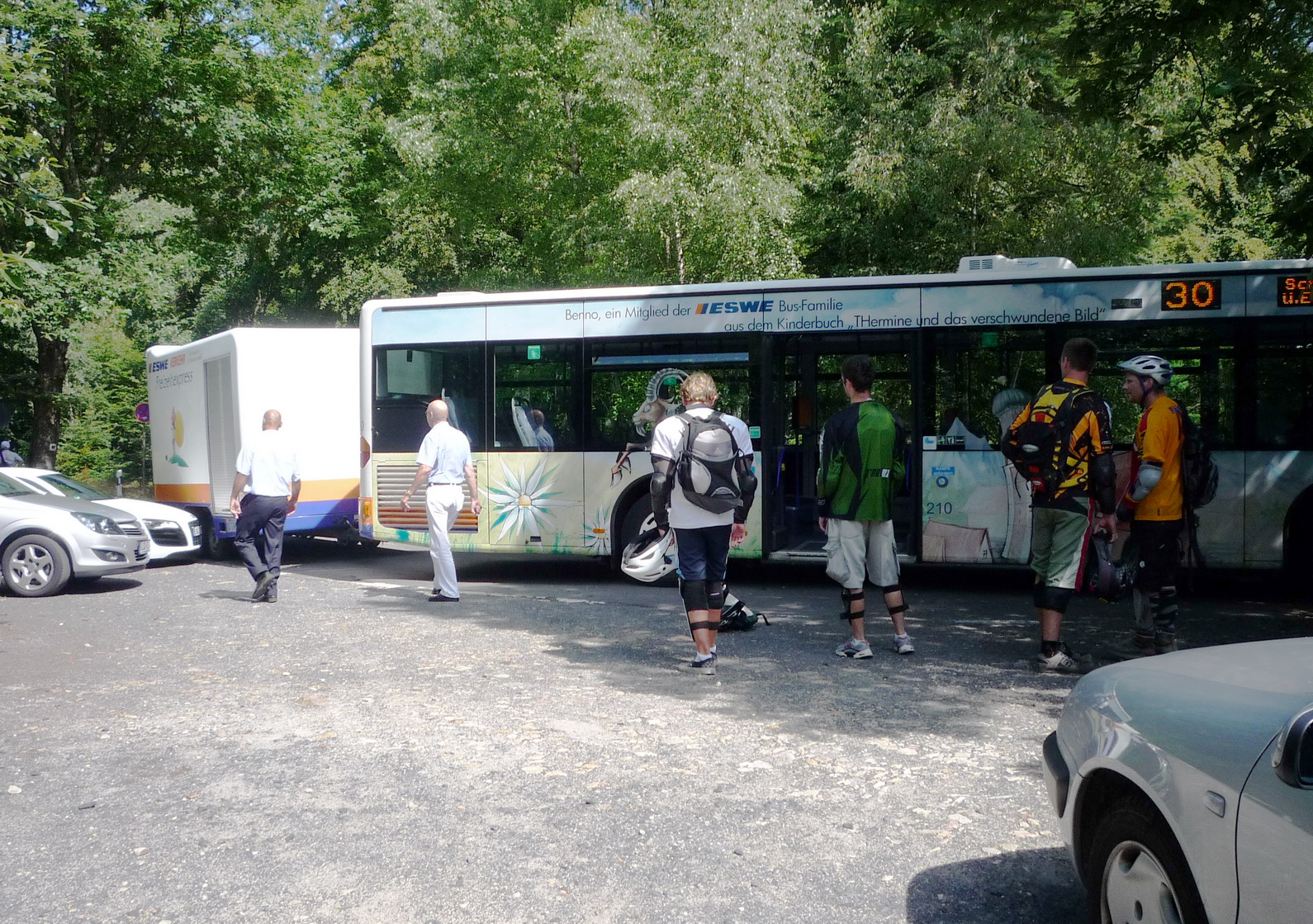 Sonntagslinie 30 von Wiesbaden Hbf (80m) zum Schläferskof (450m). Parkende Autos behindern den Busverkehr. Fährt er weiter oder zurück, wird die Front des Audi abrasiert. Geduldig warten die Fahrgäste, bis der Fahrer vom Mittagessen weggeholt wird. Der Fahrradbus in Wiesbaden ist Vergangenheit, der Betrieb wurde eingestellt.